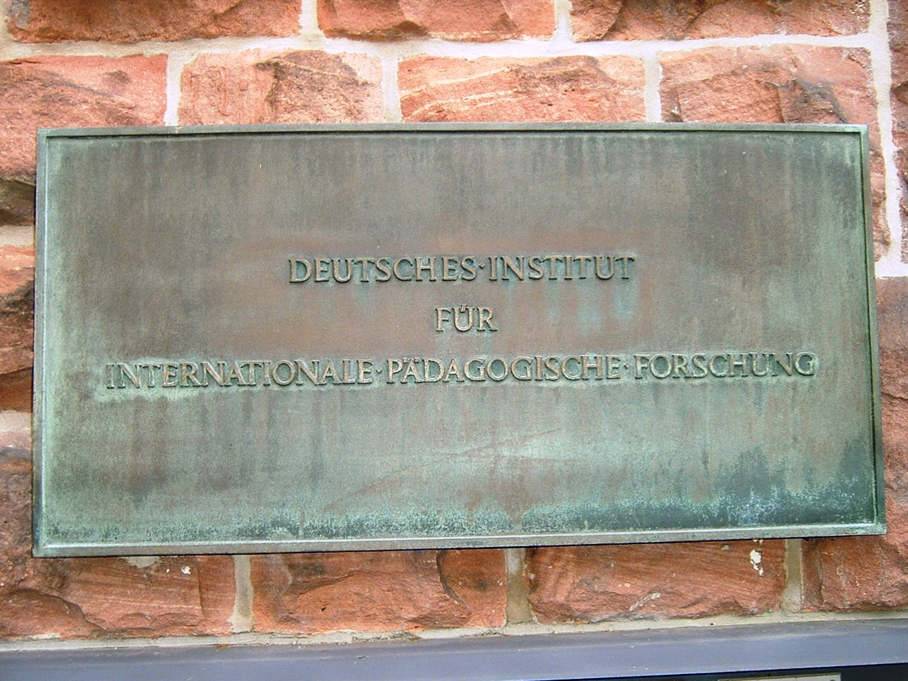 Deutsches Institut für Internationale Pädagogische Forschung, Hinweistafel